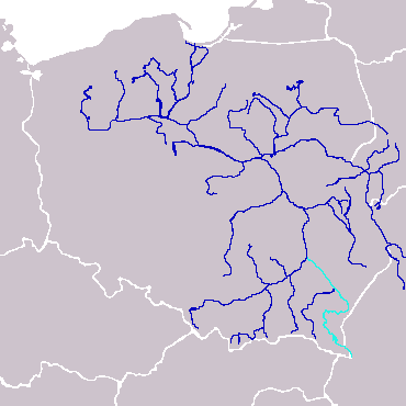 מפת הנהר סן בפולין